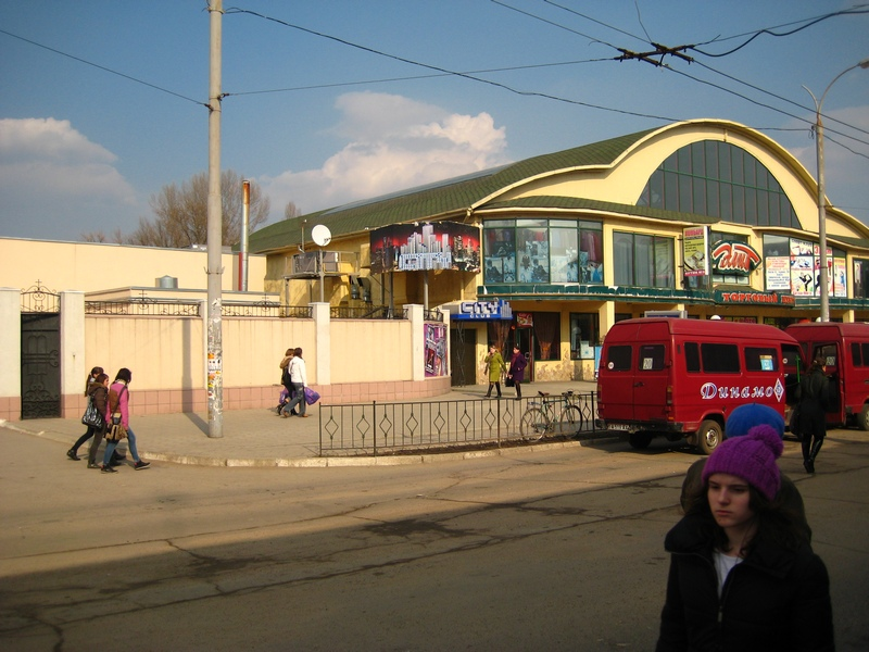 Торговый центр "Элит"